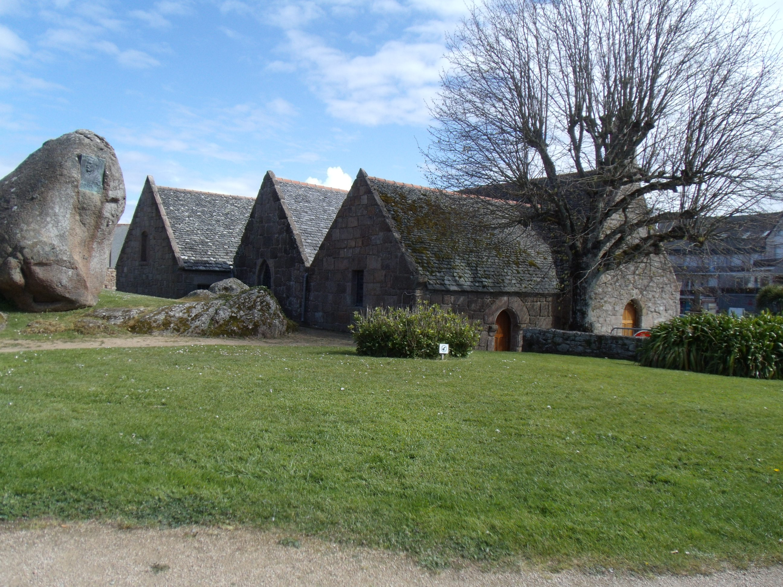 Chapelle Sainte-Anne-des-Rochers de Trégastel